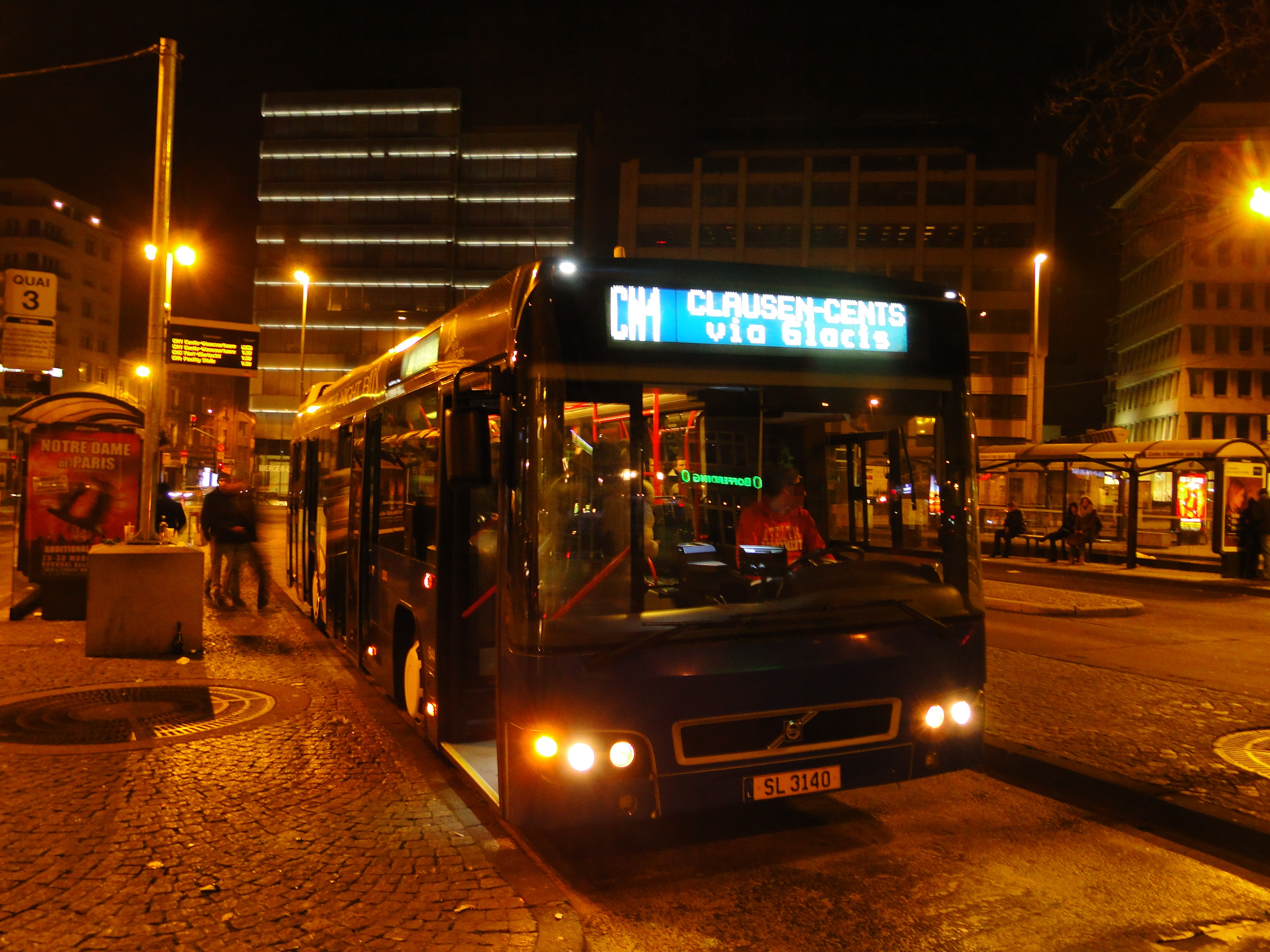 Bus FRISCH RAMBROUCH fir d'AVL (Autobus de la Ville de Luxembourg) #644 (SL 3140) op der Linn CN1